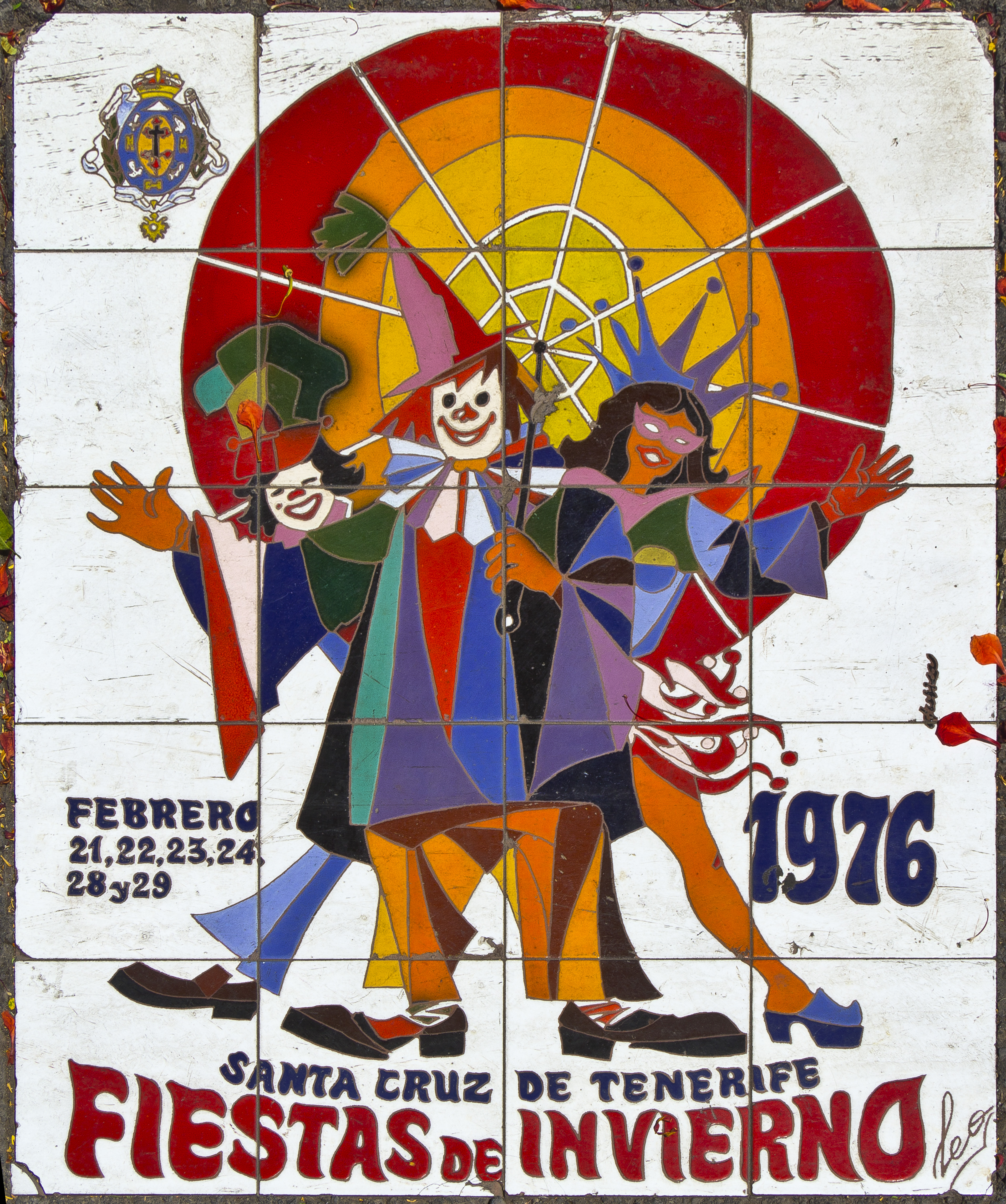 Im Dezember 1996 wurde in Santa Cruz de Tenerife eine Promenade zu Ehren der Gestalter der Karnevalsplakate eröffnet. Dort ist eine große Anzahl der Plakate als „Azulejo“ im Boden eingelassen dargestellt.